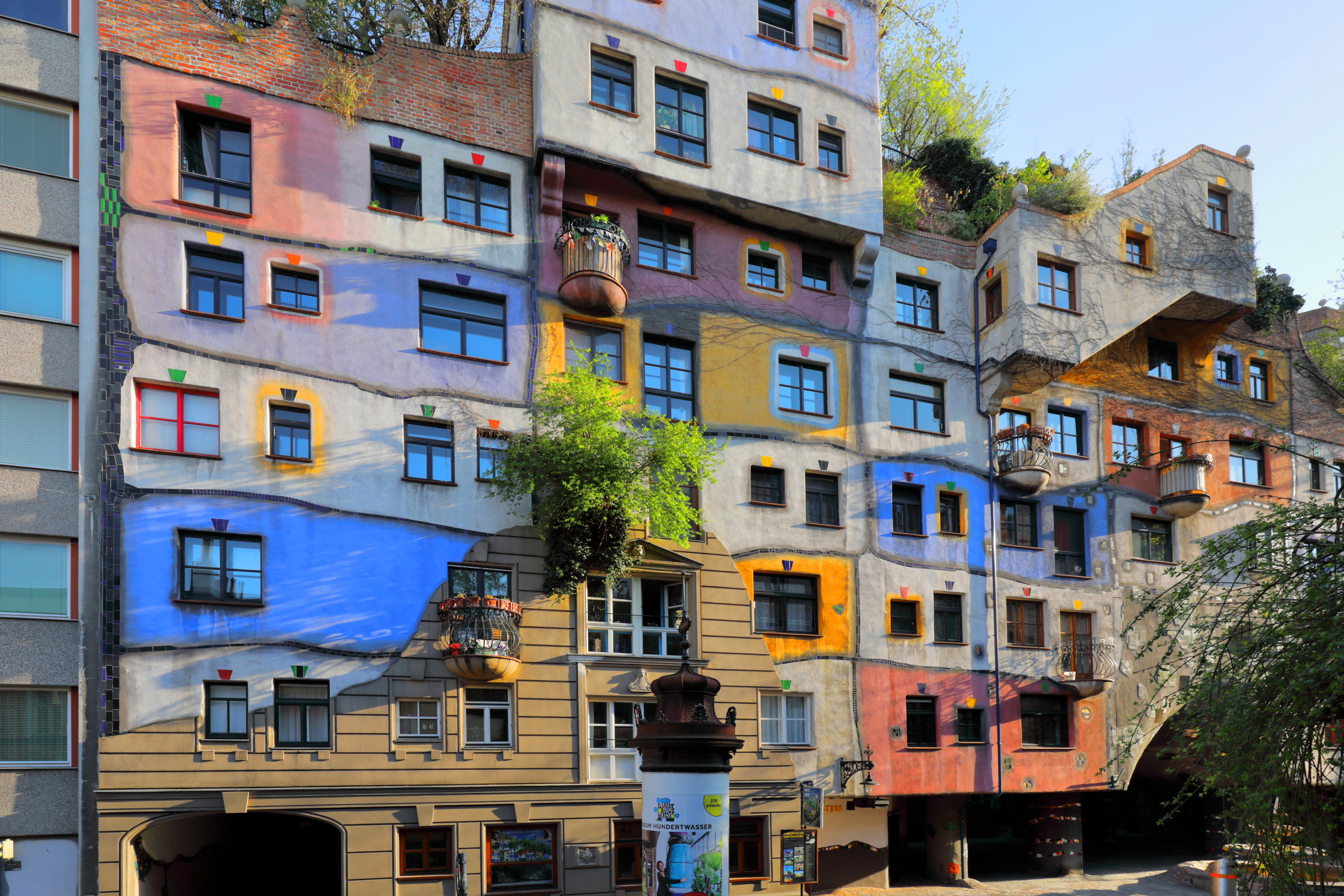 Die Fassade des Hundertwasserhauses in der Kegelgasse im 3. Wiener Gemeindebezirk Landstraße.Die Wohnhausanlage der Gemeinde Wien mit 50 Wohneinheiten wurde als Ökohaus an der Ecke Kegelgasse/Löwengasse von 1983 bis 1985 errichtet. Entworfen wurde sie von dem Künstler Friedensreich Hundertwasser, anfangs in Zusammenarbeit mit dem Architekten Josef Krawina. Nach dem Zerwürfnis Hundertwasser mit dem Architekten Krawina, wurde die Wohnhausanlage mit dem Architekten Peter Pelikan fertiggestellt.